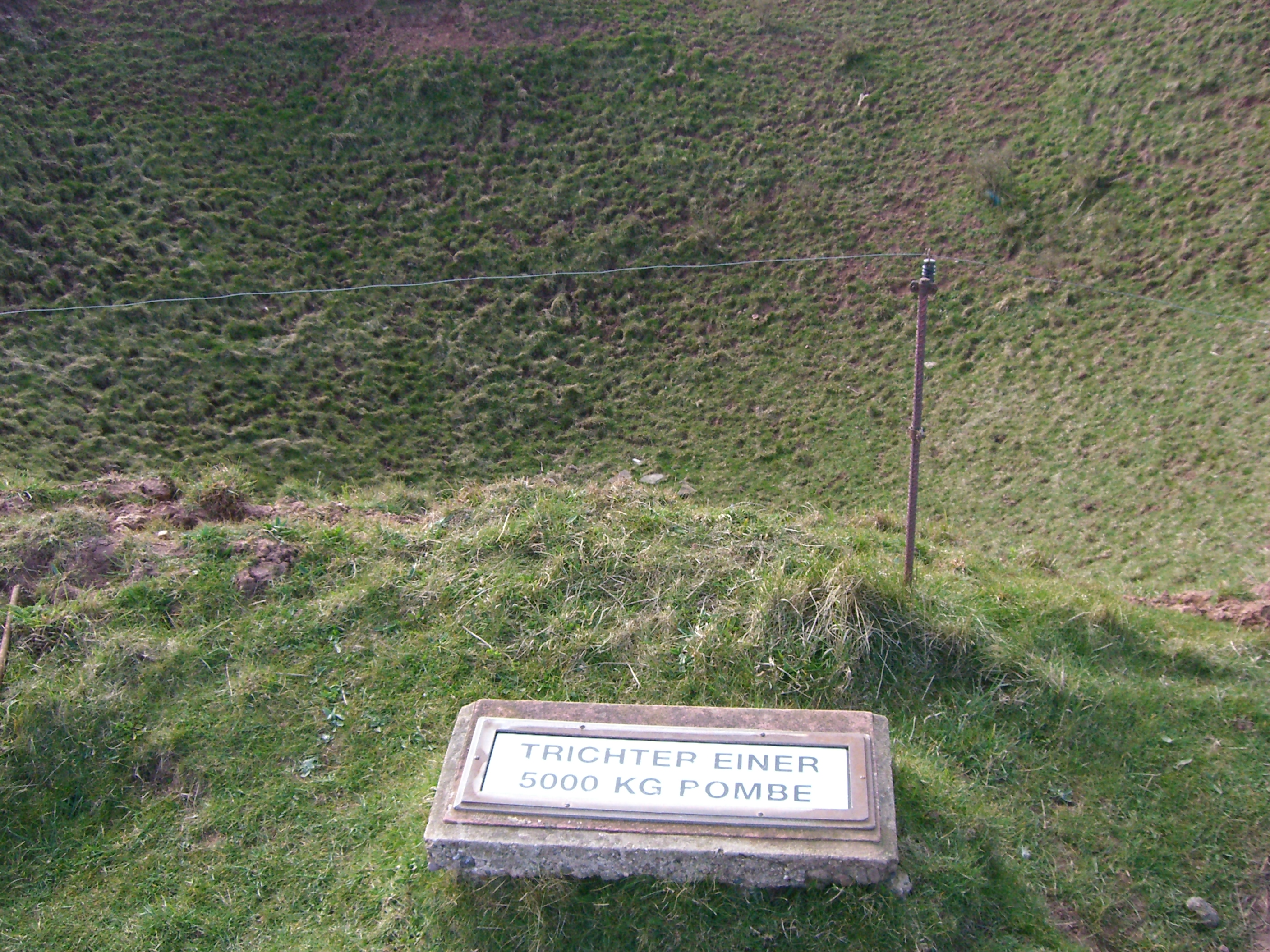 Helgoland, Trichter einer 5000-Kilogramm-Bombe auf dem Oberland